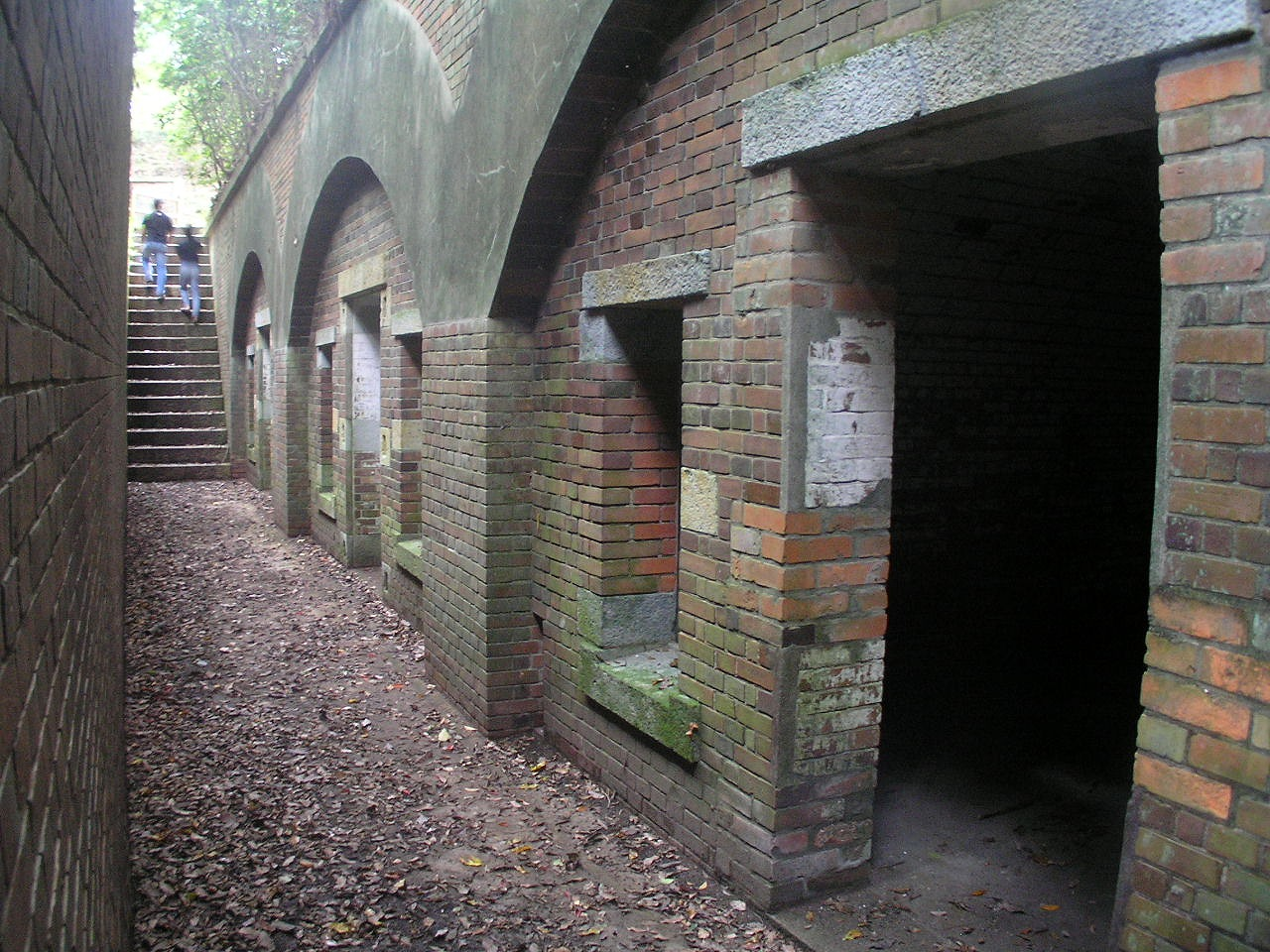 加太砲台由良要塞 レンガ倉庫